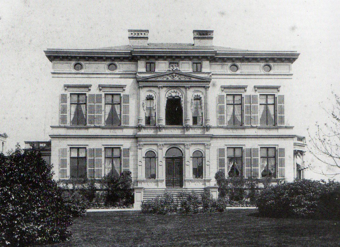 Villa Loeschigk, Bonn: Straßenfront, links ein Anbau von 1875–1879 und Turm eines Nebengebäudes